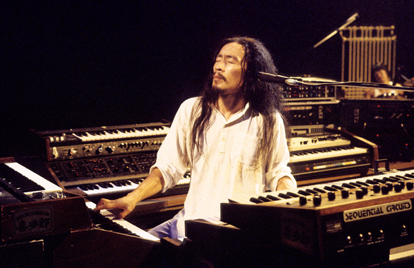 کیتاروی جوان